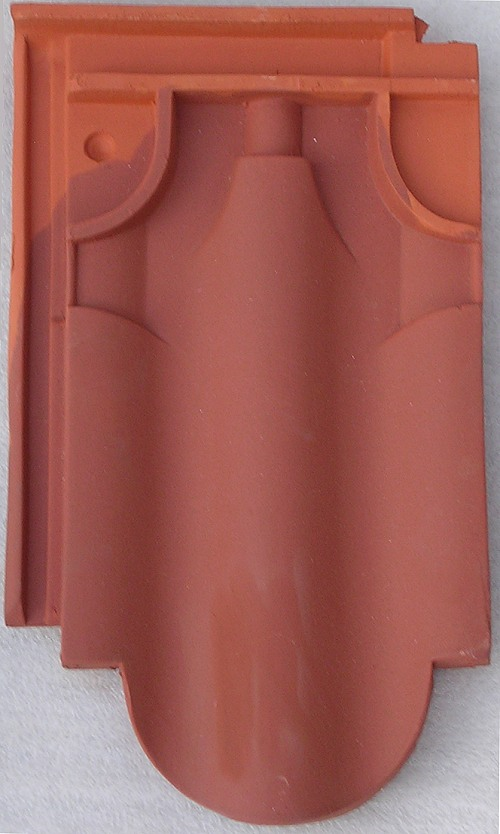 Pressdachziegel - Schuppenfalzziegel Luduwici Z2 rot engobiert